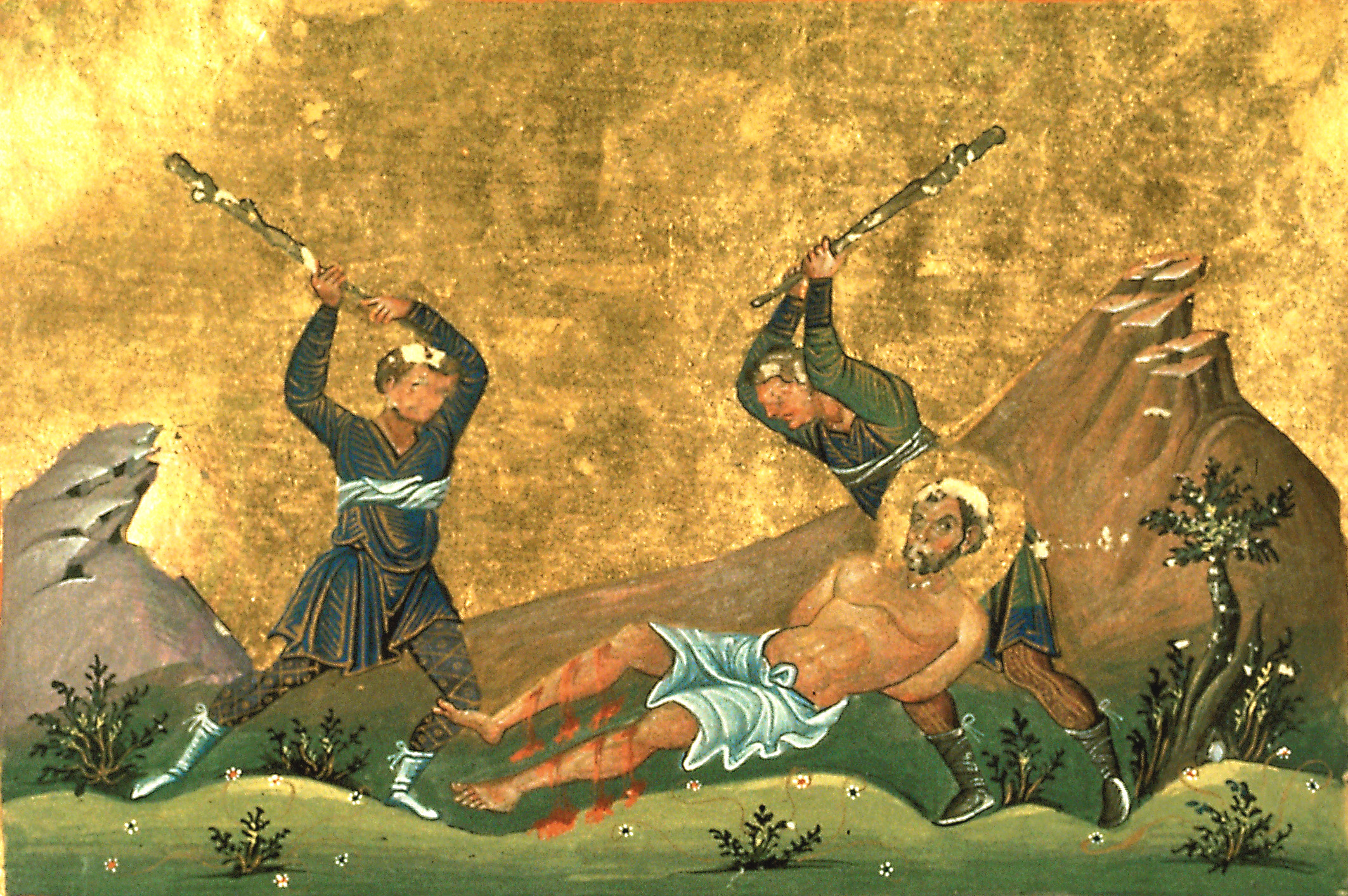 Апостол от 70-ти Онисим . Константинополь. 985 г. Миниатюра Минология Василия II. Ватиканская библиотека. Рим.